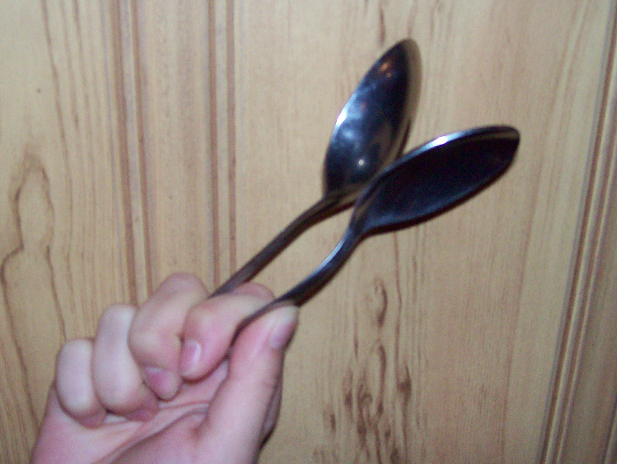 Comment tenir deux cuillères pour en faire un instrument de percussion.